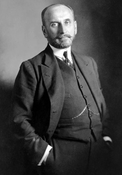 Сазонов Сергей Дмитриевич